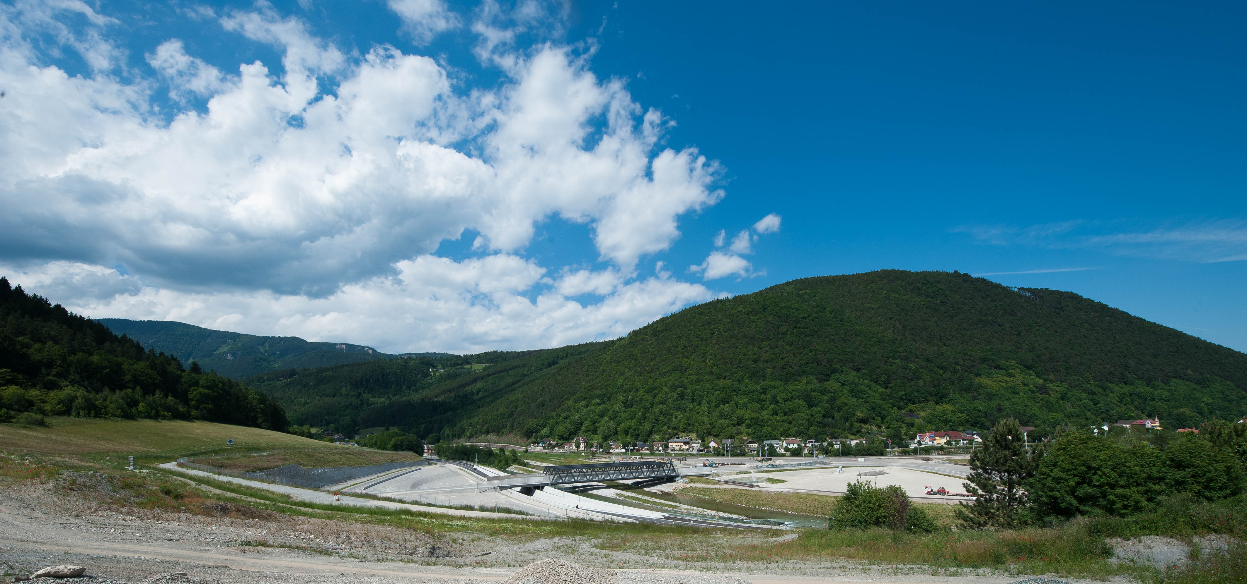 Semmeringbasistunnel: Baustelle Gloggnitz